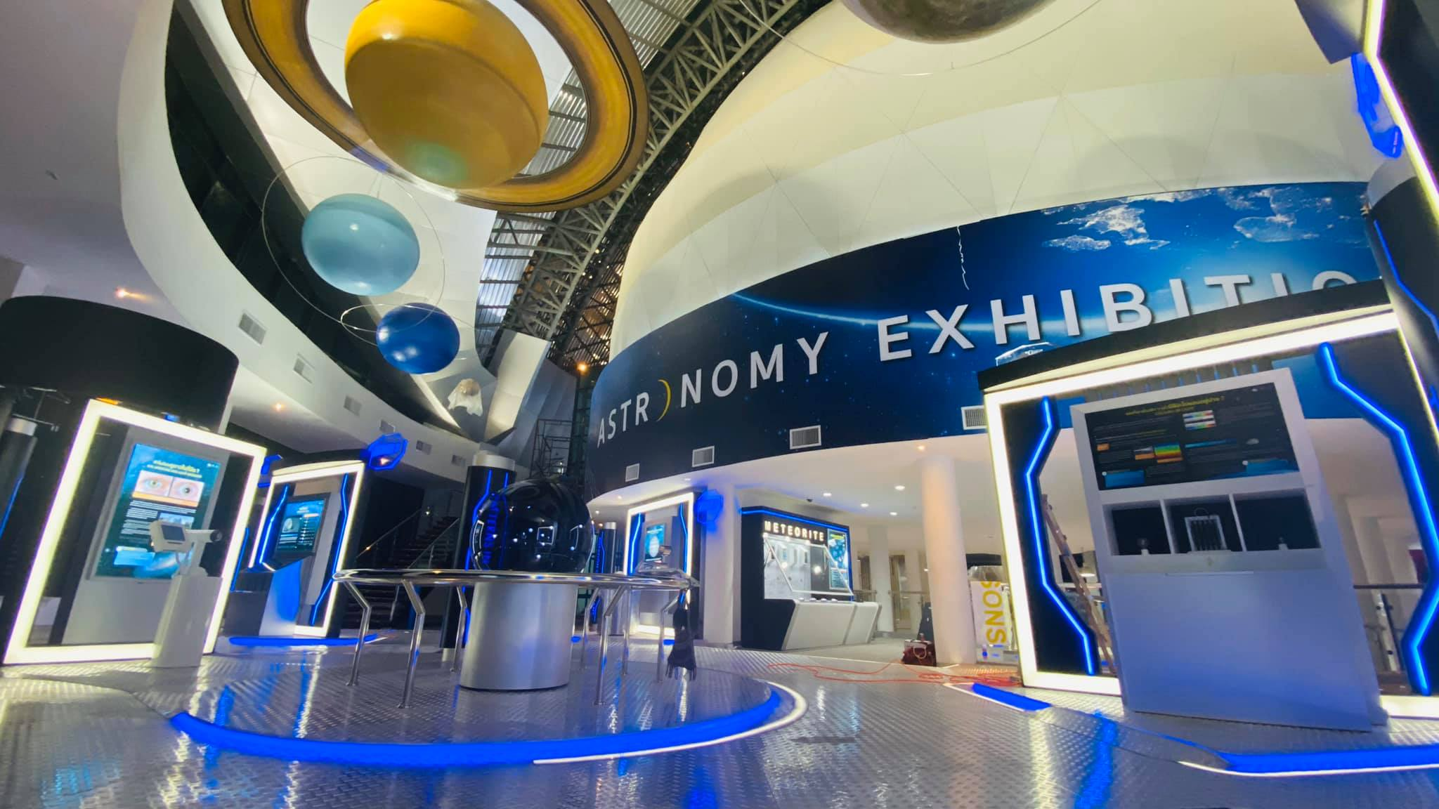 นิทรรศการดาราศาสตร์ ณ อุทยานดาราศาสตร์สิรินธร